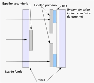 Diagrama de um pixel telescópico